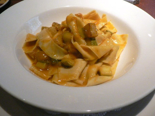 Pappardellepapardelle with tomato sauce